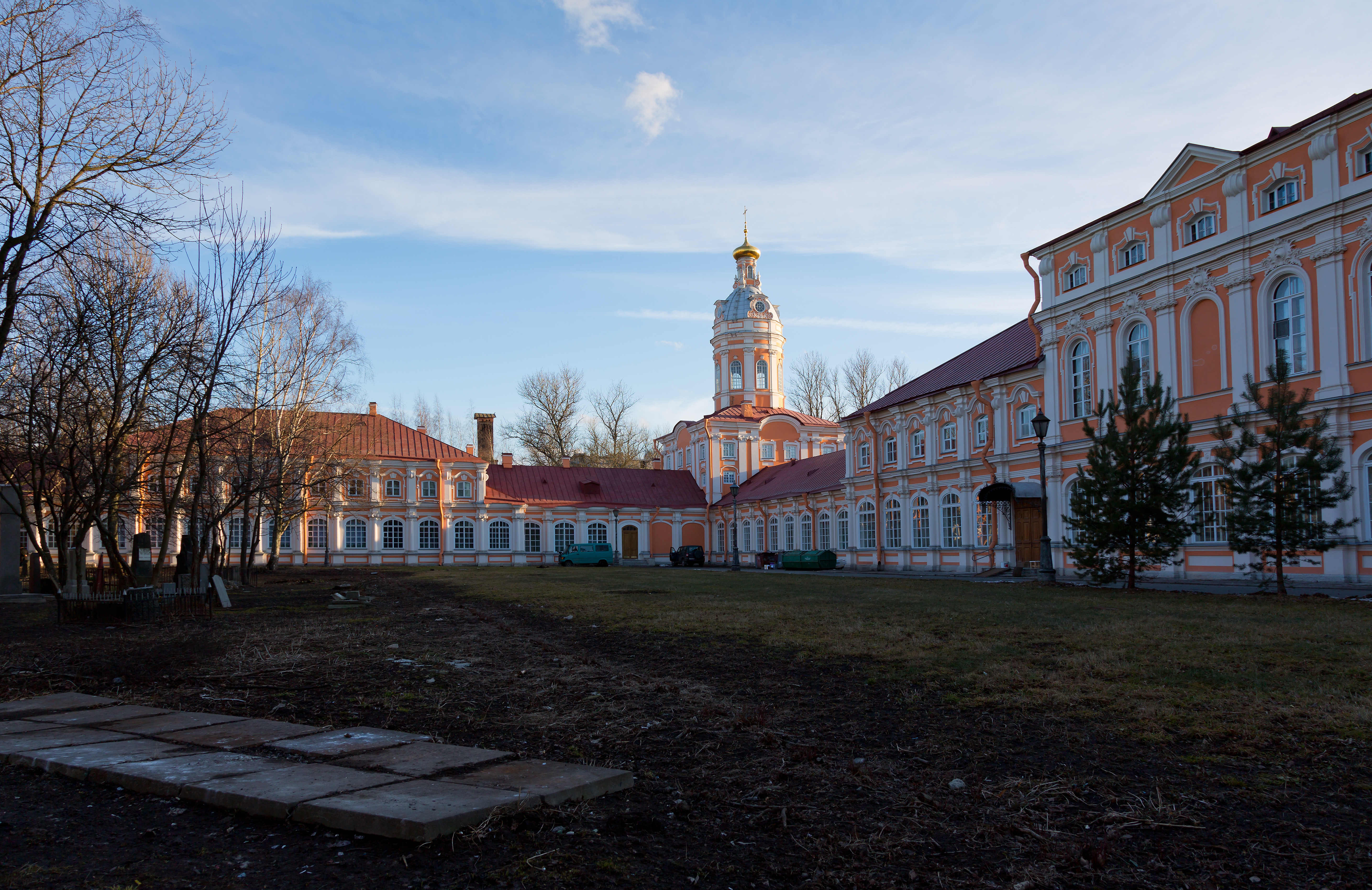 Корпус митрополичий с двумя башнями (Санкт-Петербург и Лен.область, Санкт-Петербург, р. Монастырки наб., 1)